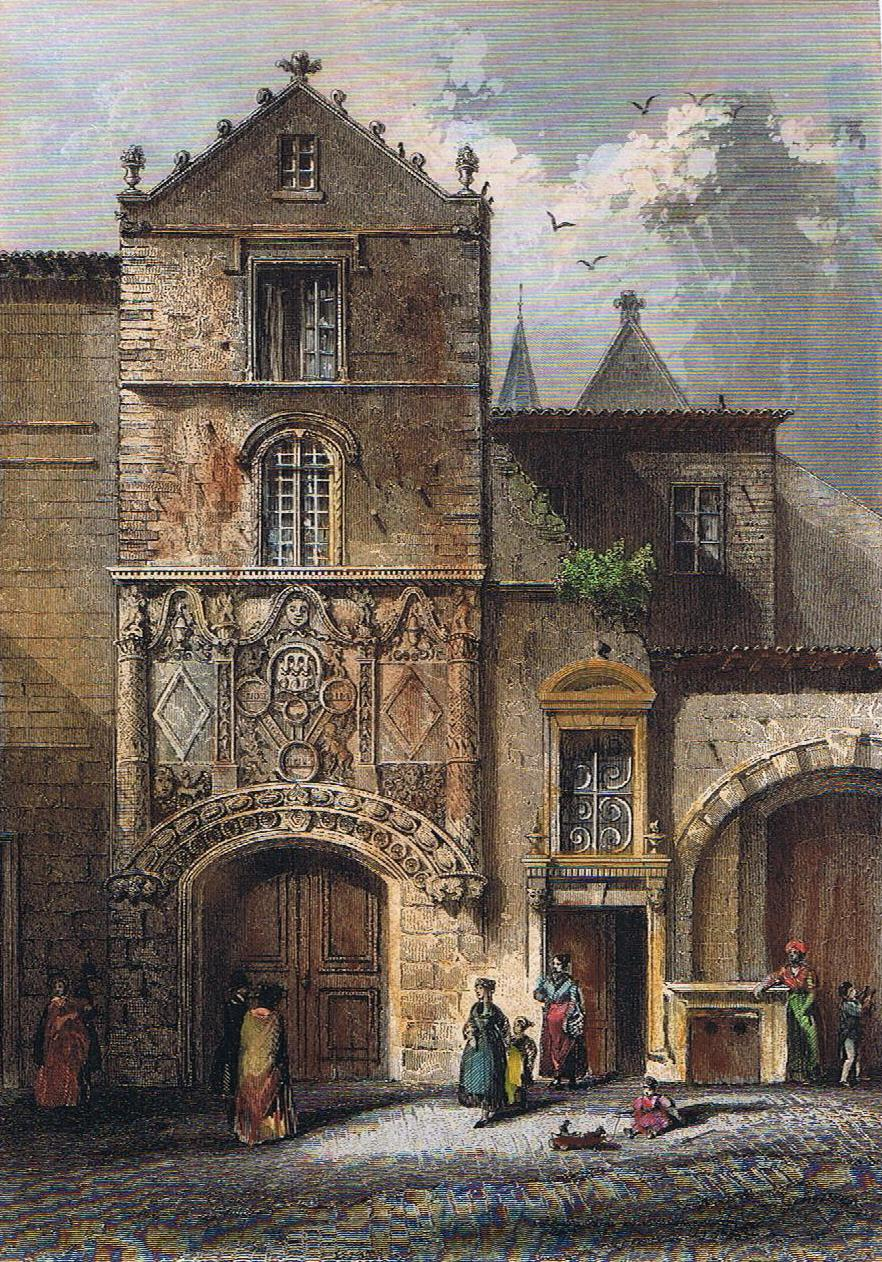 Bas relief Espagnet Caption Maison Rue des Bahutiers No 4